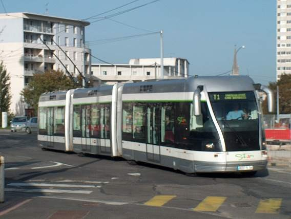 Le_TVR_de_Nancy.jpg